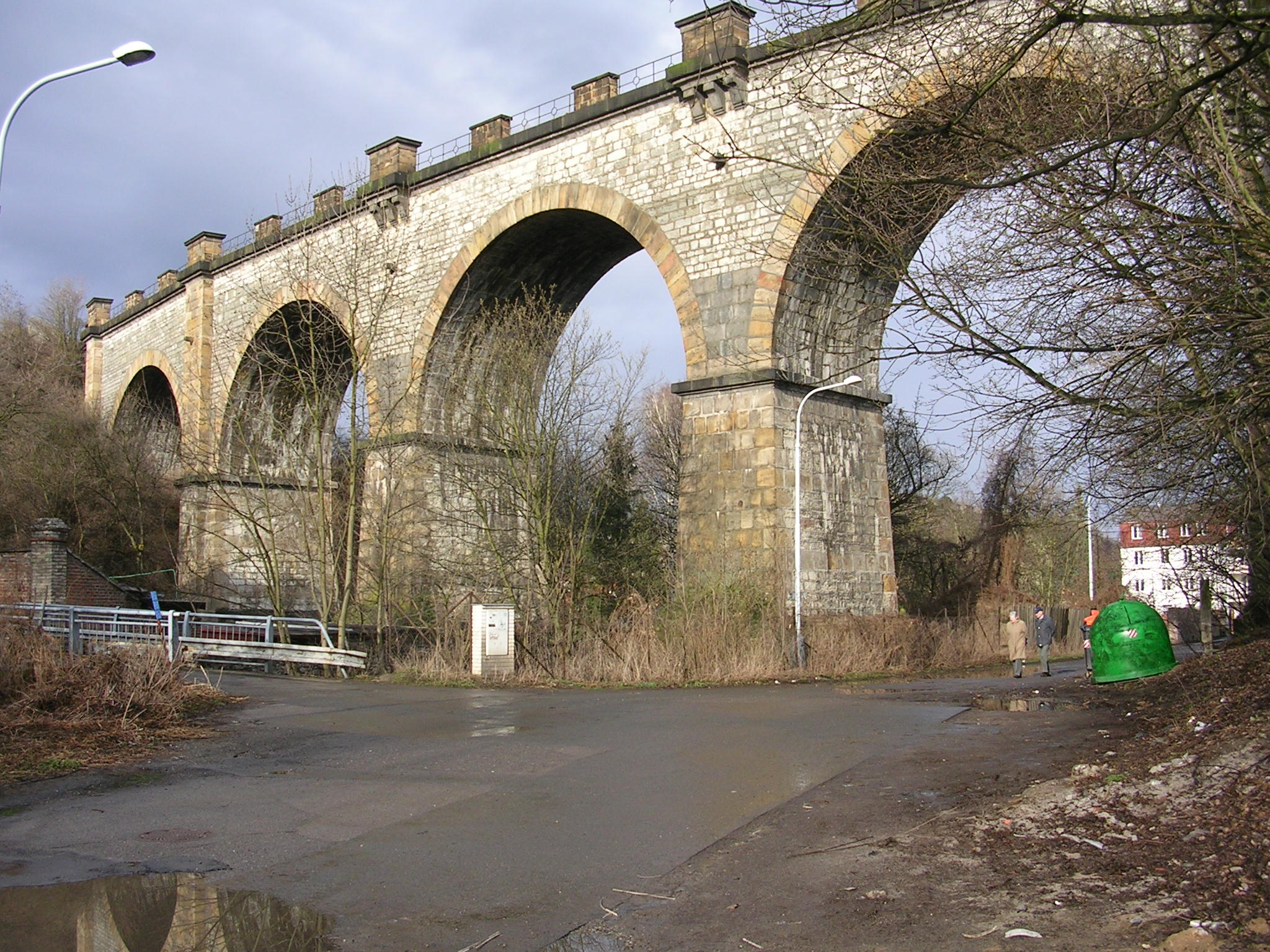 Hlubočepský viadukt na trati č. 122